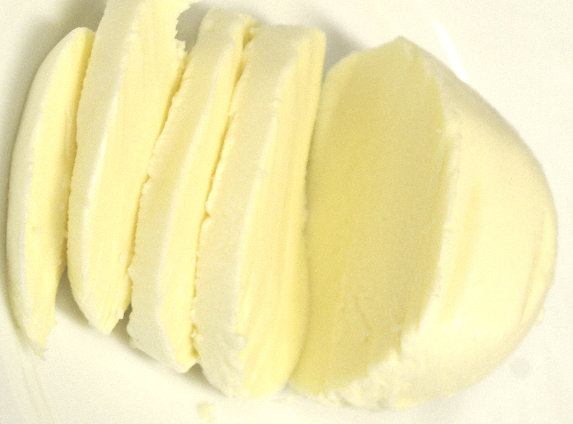 Mocarella siers